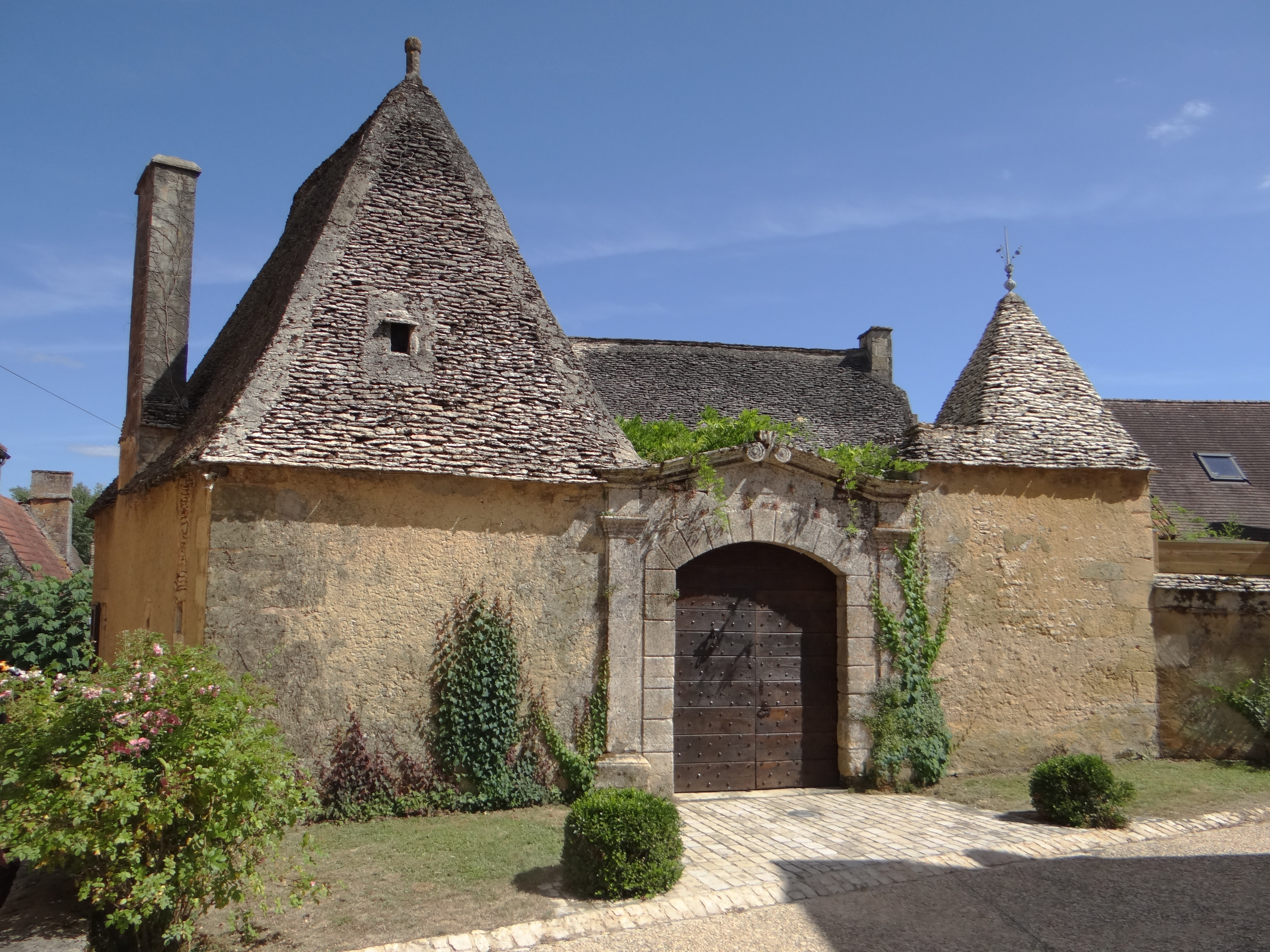 Meyrals - Vieille maison près de l'église